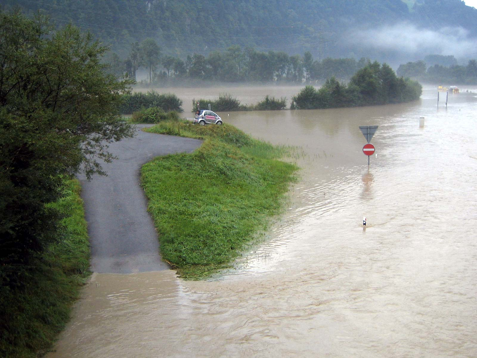 Überfluttete Autobahnauffahrt A8 bei Brienz BE